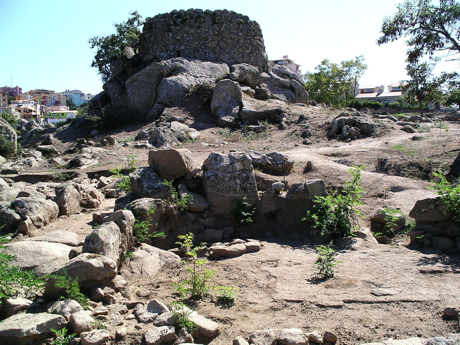 autore M. Oppo, scavi attorno al nuraghe Tanca manna. Foto personale, Nuoro, settembre 2005.